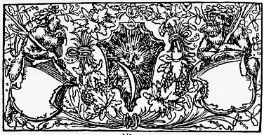 Застаўка Дзікія людзі. Выкарыстана 9 разоў: у кнігах "Ісус Сірахаў", "Еклезіяст", "Царстваў" (чатырохразова), "Выхад", "Песня песняў", "Прамудрасць божая" (на апошнім лісце ў якасці фіналі). 106Х52/53 мм. Палі гербавых шчытоў першапачаткова заставаліся пустымі. У некаторых асобніках выданняў у шчыты ўпісаны ад рукі розныя манаграмы.